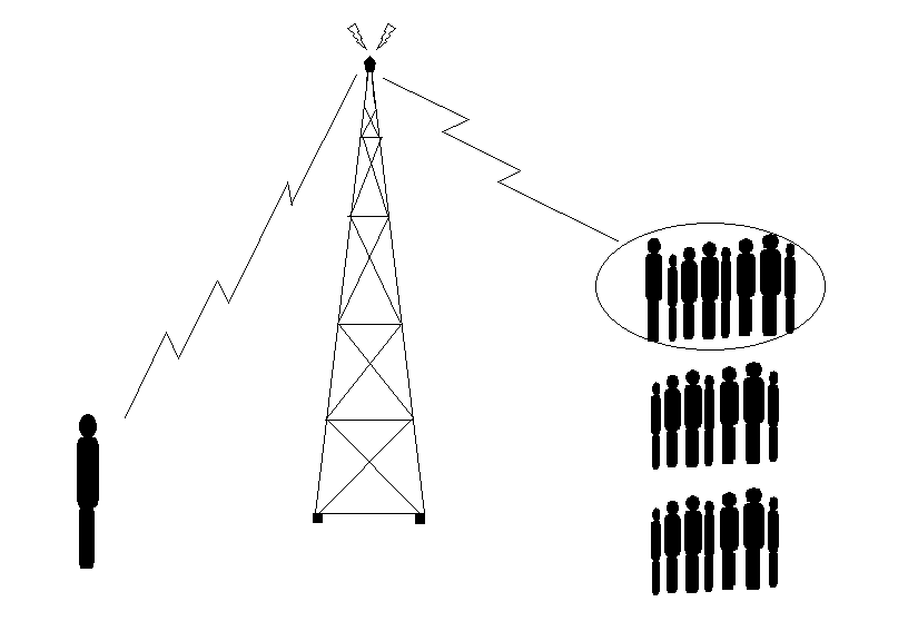 Groepsgesprek